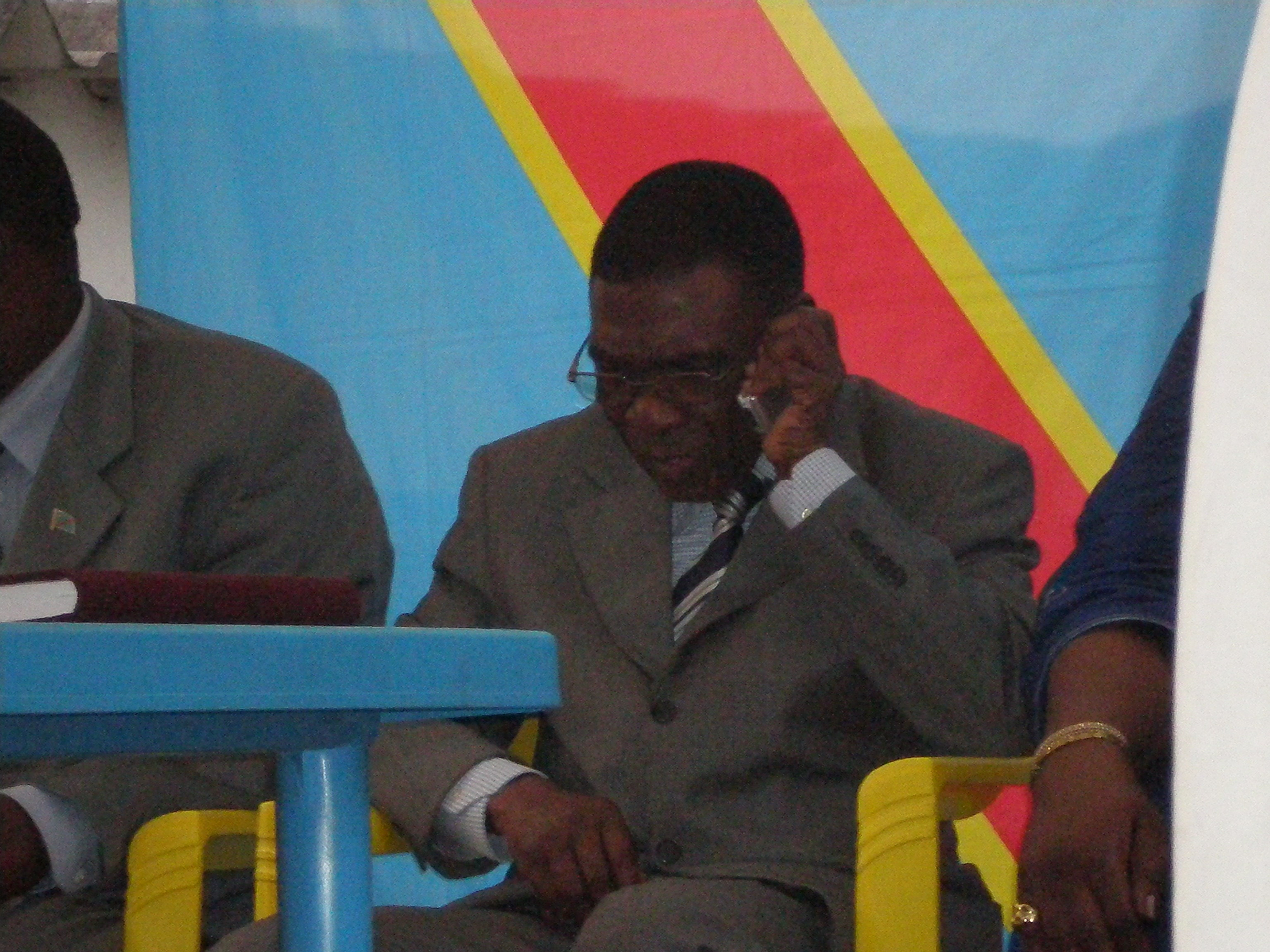 FIKIN 2007